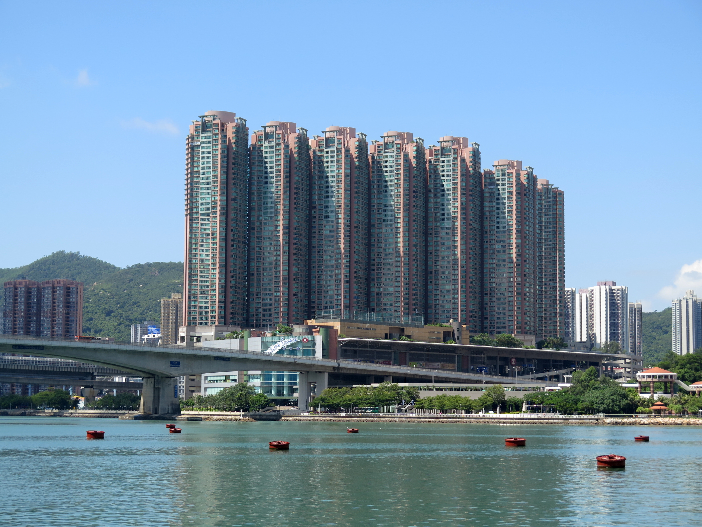 Tierra Verde, Tsing Yi